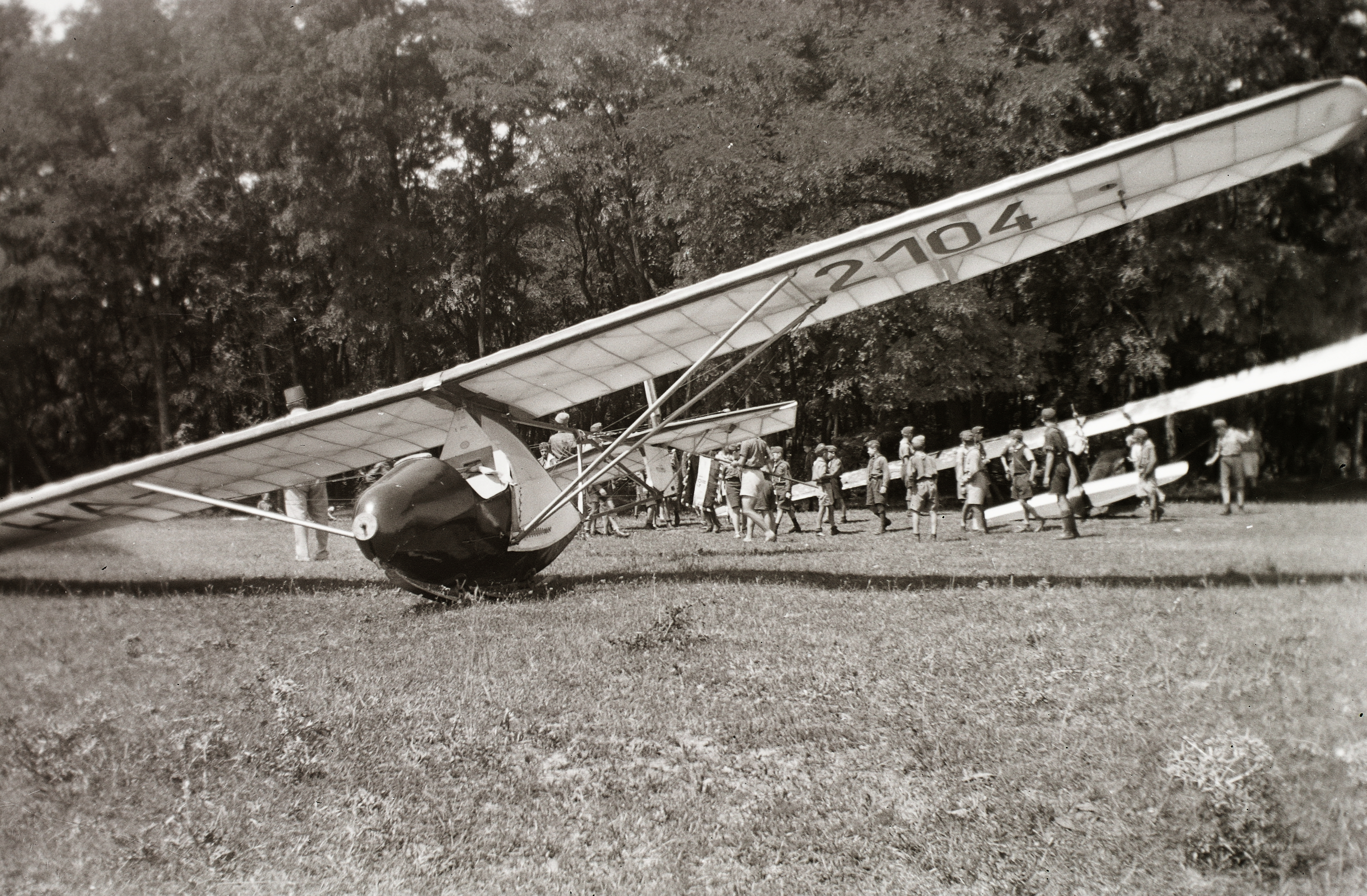 Rubik R-07b Vöcsök vitorlázó repülőgép. Tags: transport, airplane, sailplane, airport, Hungarian brand, scouting, genre painting Title: Rubik R-07b Vöcsök vitorlázó repülőgép.